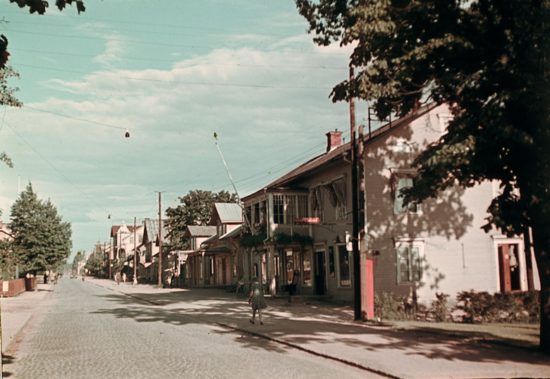 Storgatan i Kil? Motiv: Kil Nyckelord: Riksintressen Kategori: Stadsmiljö Storgatan i Kil?.